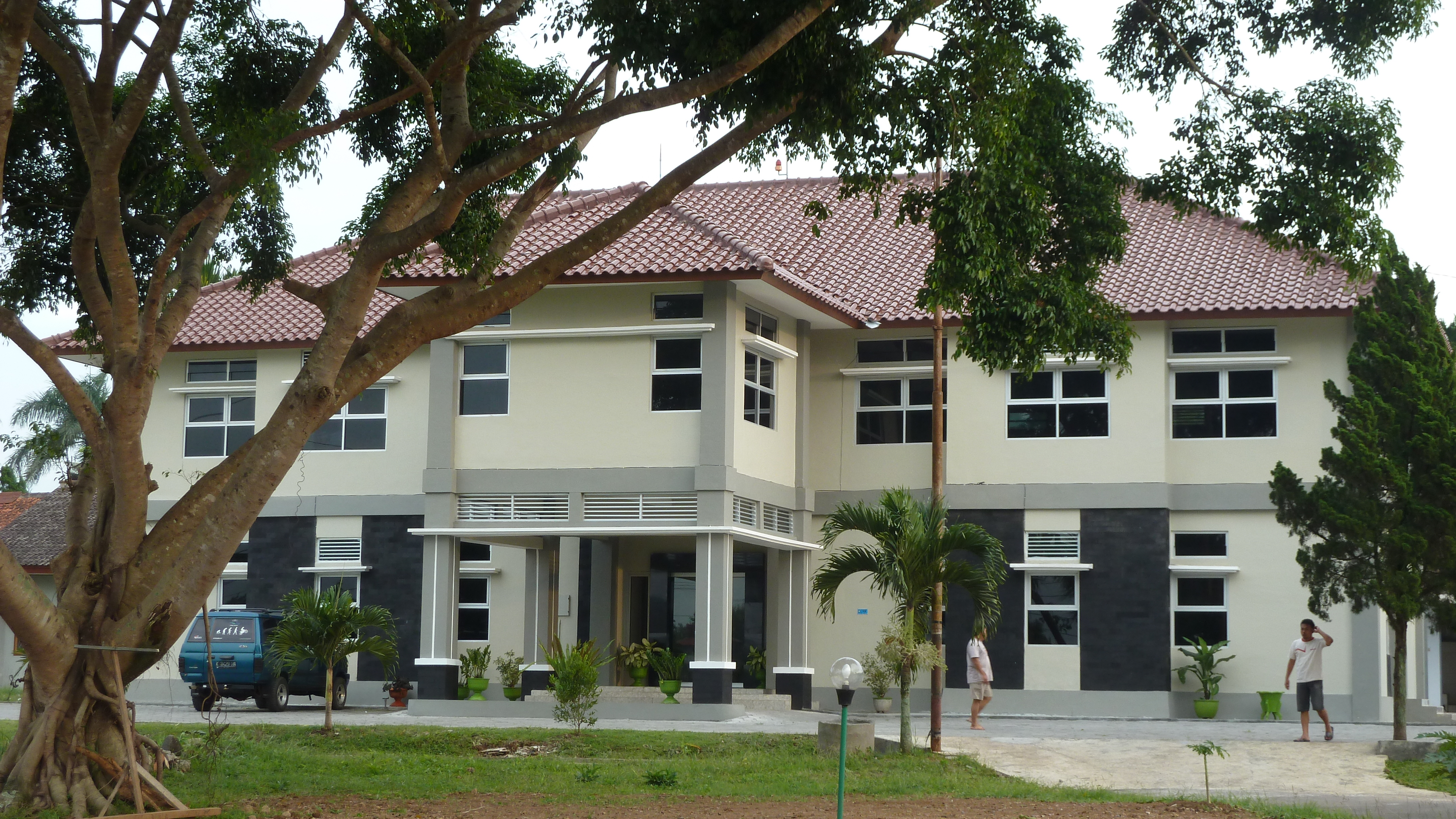 Gedung BPSDM Tan